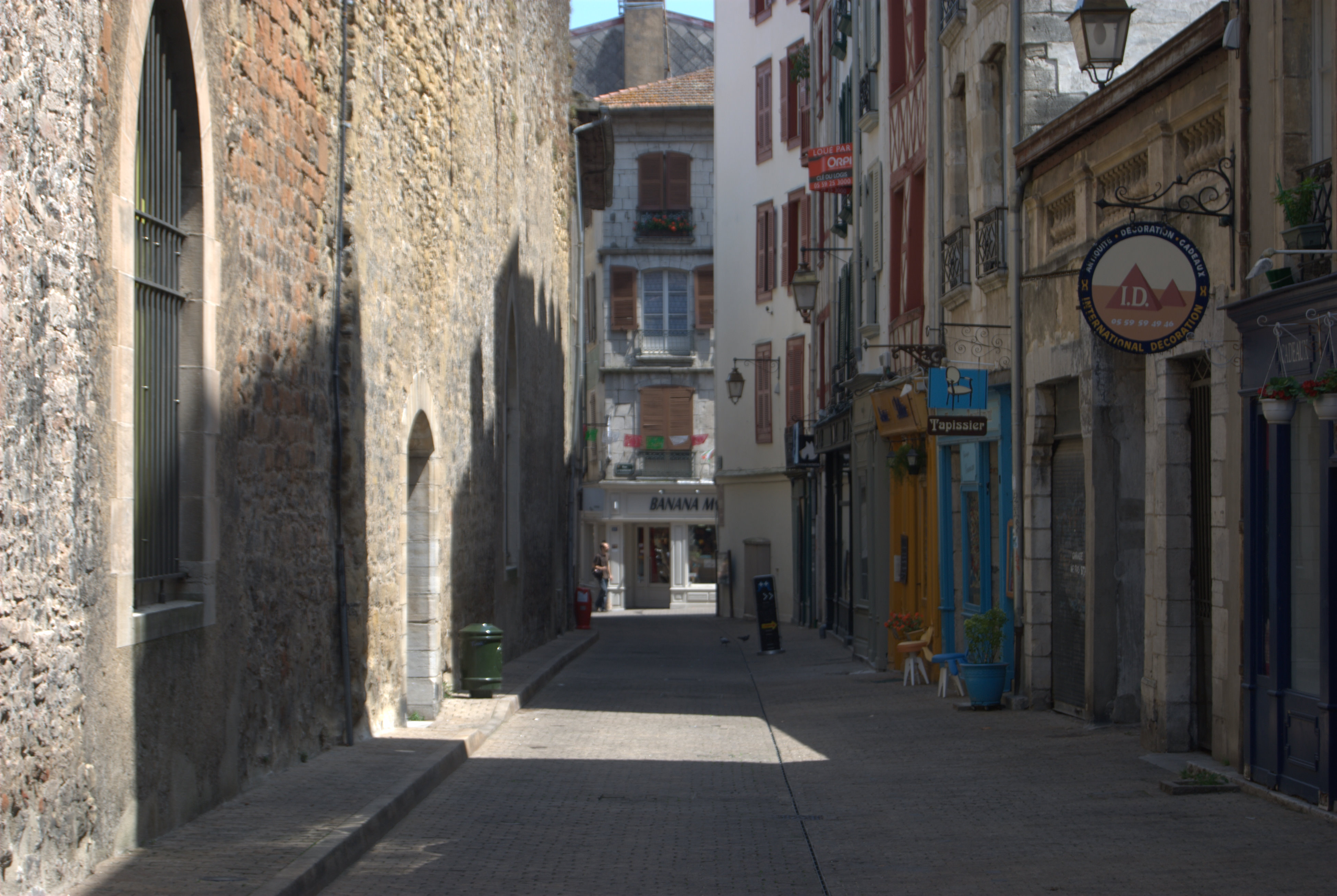 La rue de Luc vue depuis la rue Montaut, Bayonne.